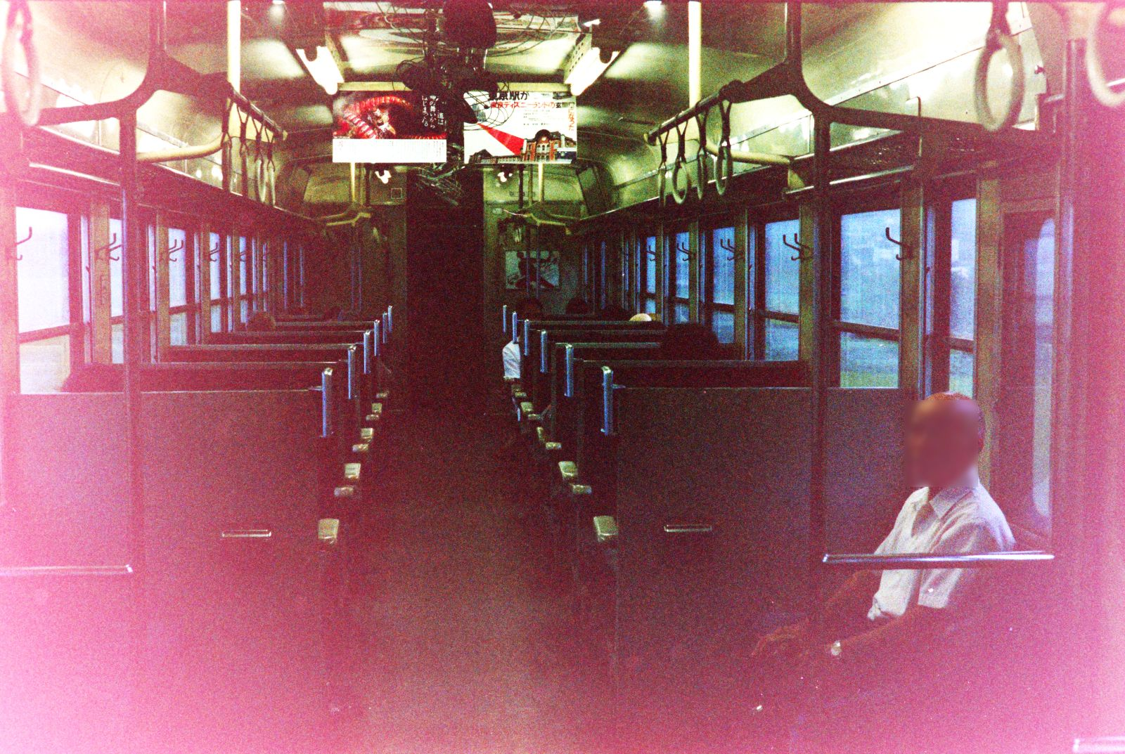 国鉄宮原線・肥後小国行キハ53の車内